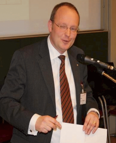 Carsten Stark, Hof (Saale)